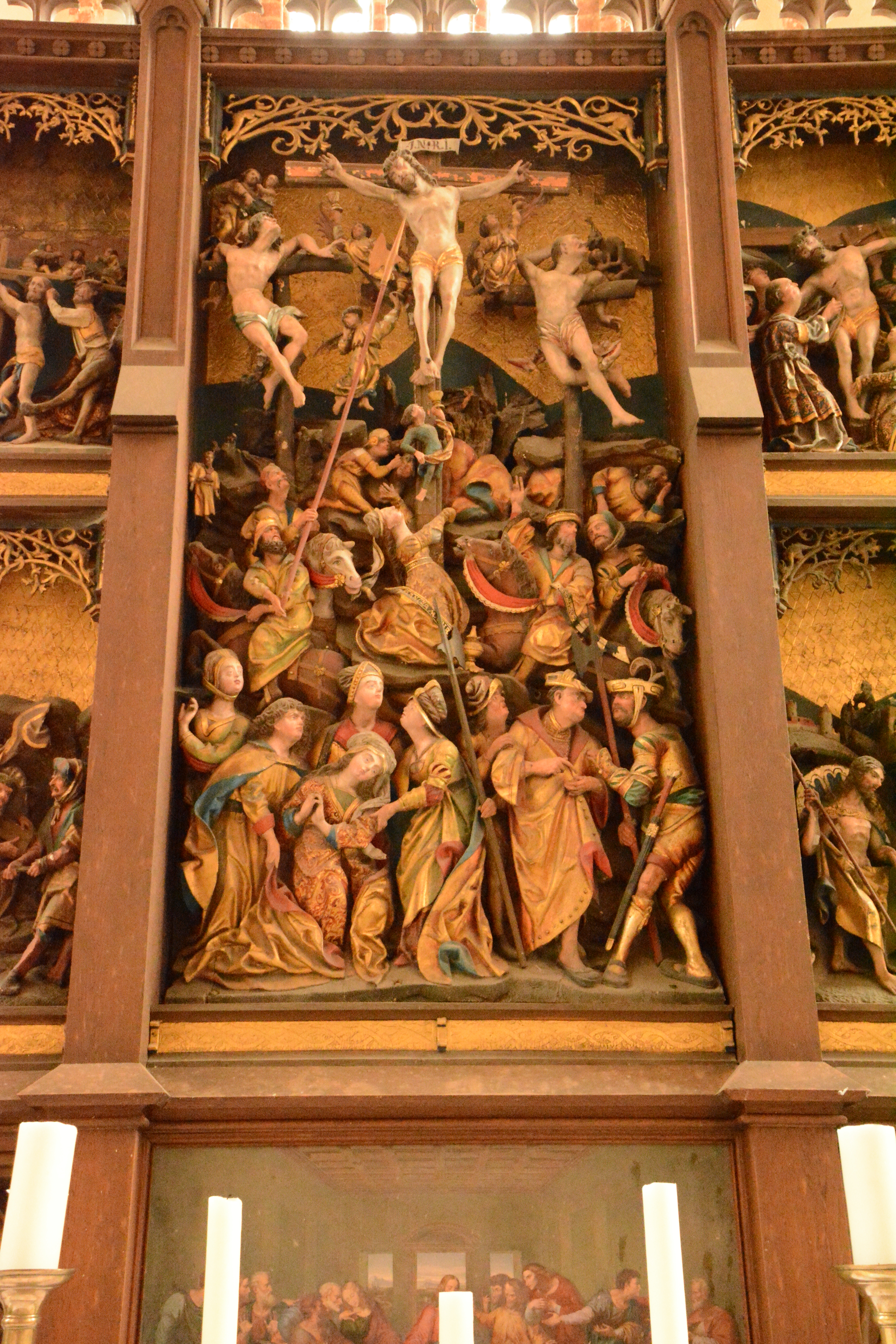 St. Petri (Seehausen) Detailansicht